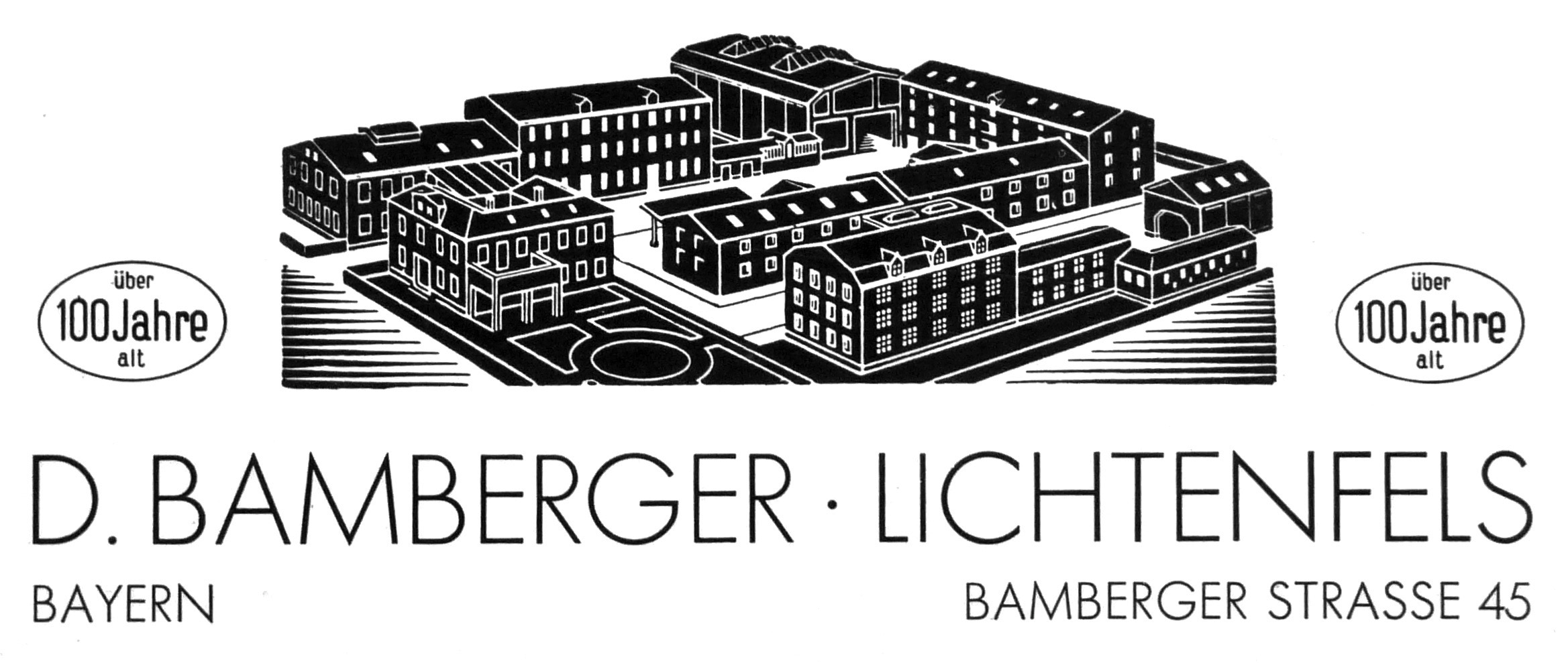 Ausschnitt einer Werbeanzeige der Firma D. Bamberger aus Lichtenfels, Oberfranken, undatiert, nach 1925 (angegebenes Jubiläum) und vor 1939, da Ende 1938 „arisiert“ zu „Knorr, Friedrich & Co.“